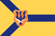 Прапор Снятинського району